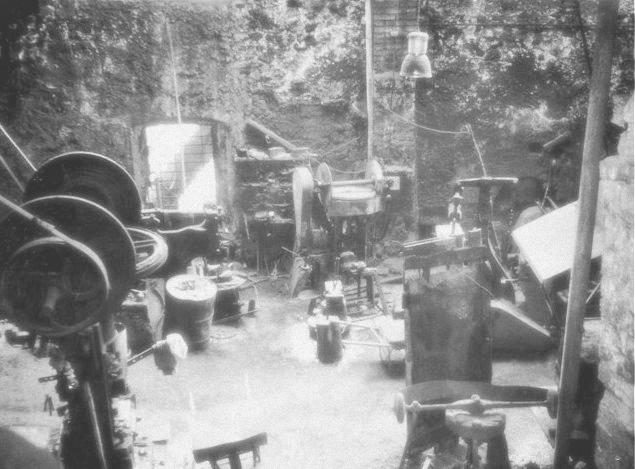 Interno della vecchia "Fucina di Pamparane" (Fucina Leali), prima del restauro a Museo.